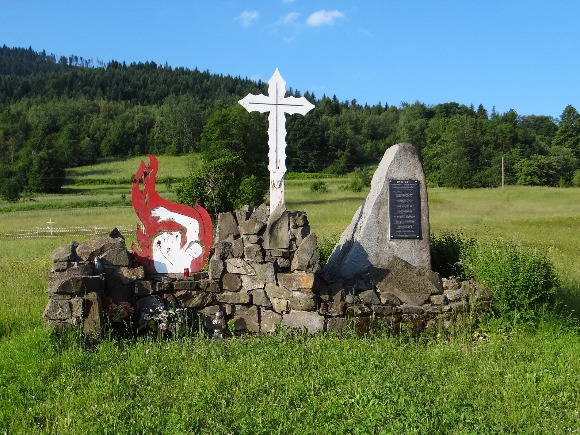 Pomnik zamordowanych przez hitlerowców mieszkańców wsi Gruszowiec